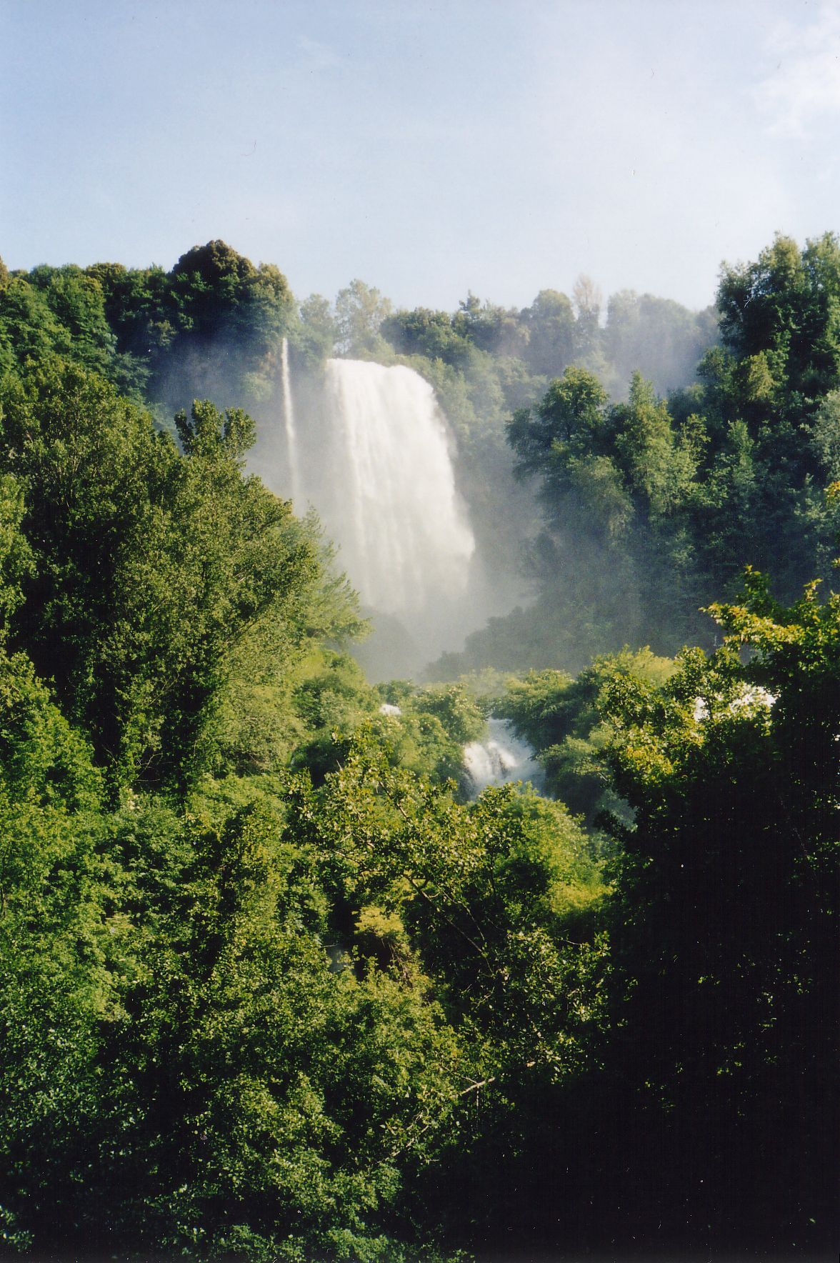 Scattata da me stesso nel 1999